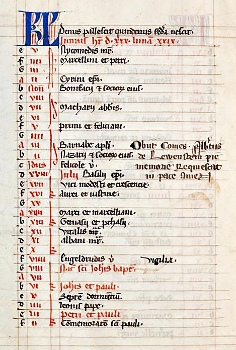 Kalenderblatt "Juni" aus dem Codex Lichtenthal 37, aus dem Wormser Kloster Kirschgarten, von der Nonne Anna von Bolanden (+ 1320) stammend.